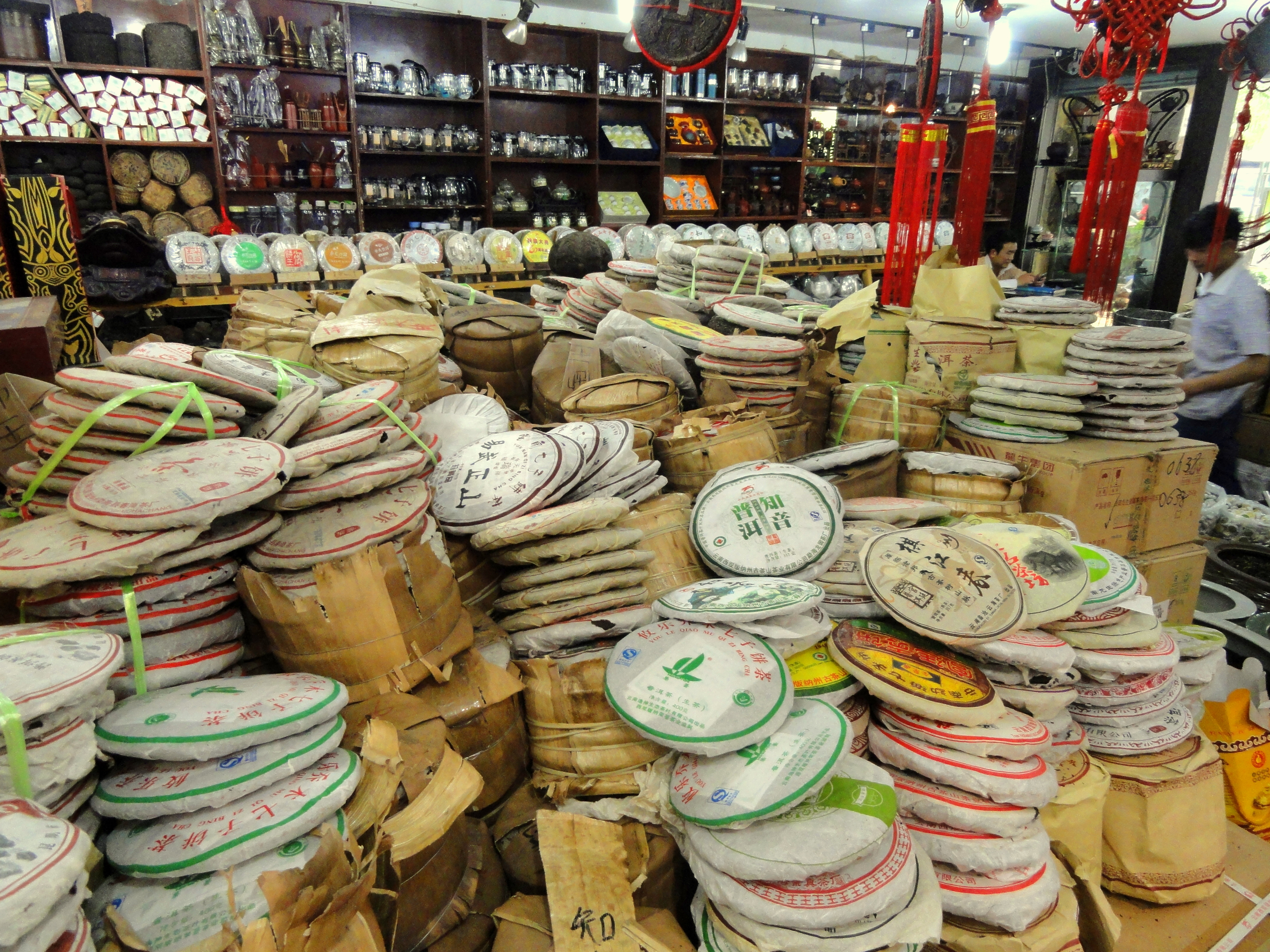 Tea shop in Kunming, Yunnan, China.